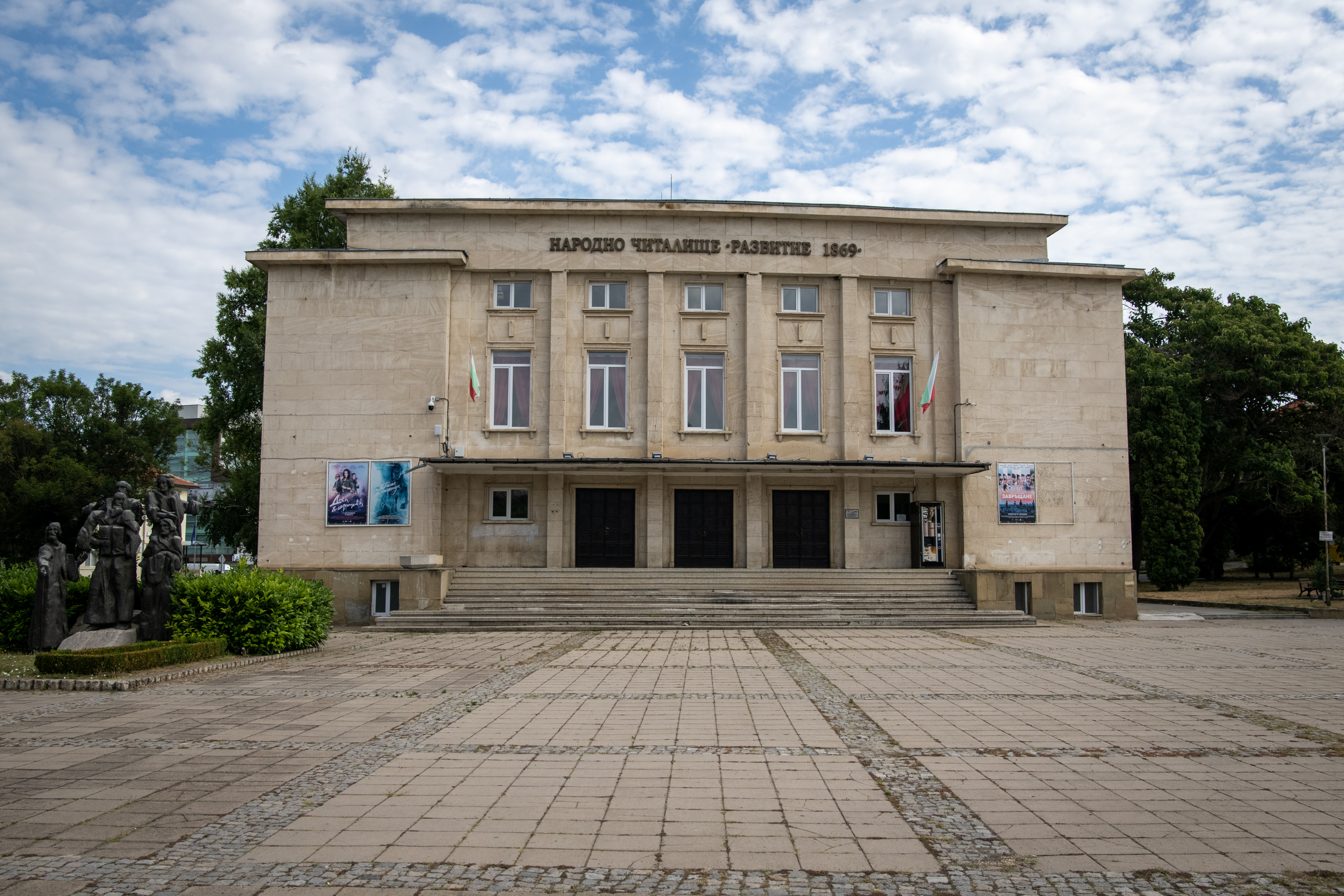 Снимката документира читалище "Развитие" в град Разград.